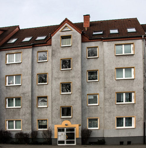 Haus der Familie KönigsbergerLöwenstein in der Faßstr. 22